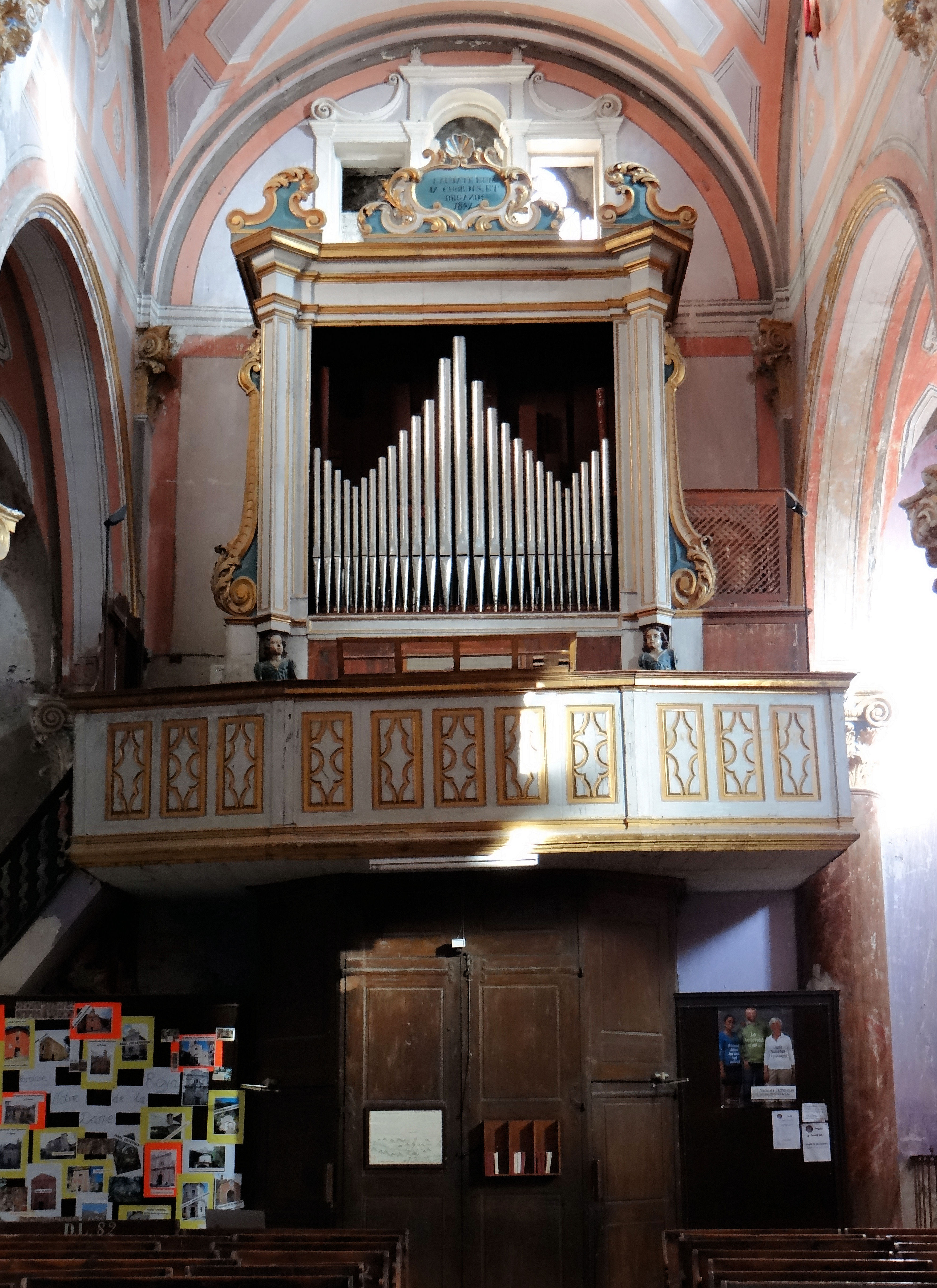 Saorge - Église Saint-Sauveur - Orgue Lingiardi